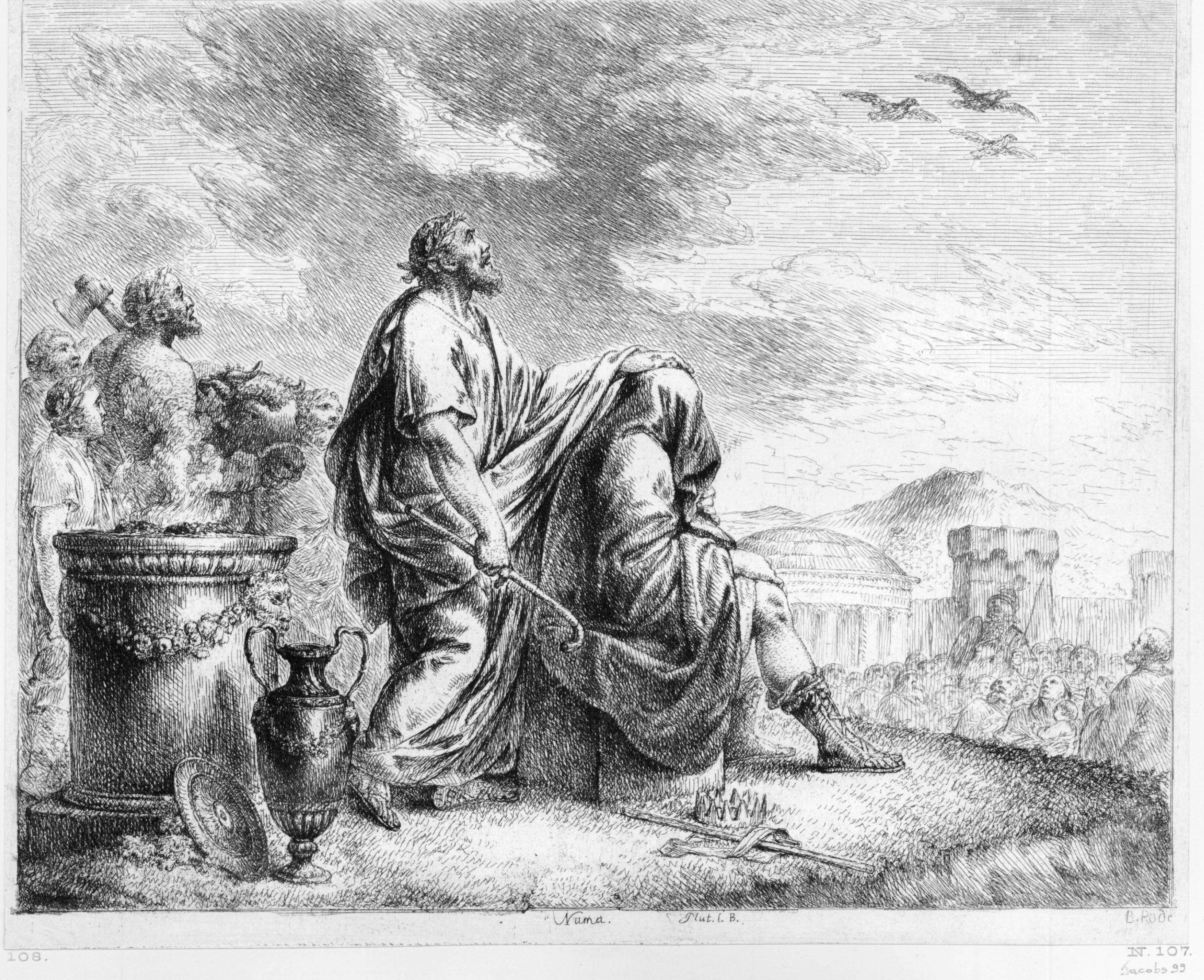 Ein Augur erklärt Numa Pompilius nach dem Orakel des Vogelfluges zum König, Radierung von Bernhard Rode 1768-69. Numa mit verhülltem Angesicht wird von dem Wahrsager aus dem Fluge der Vögel für einen glücklichen König erklärt.